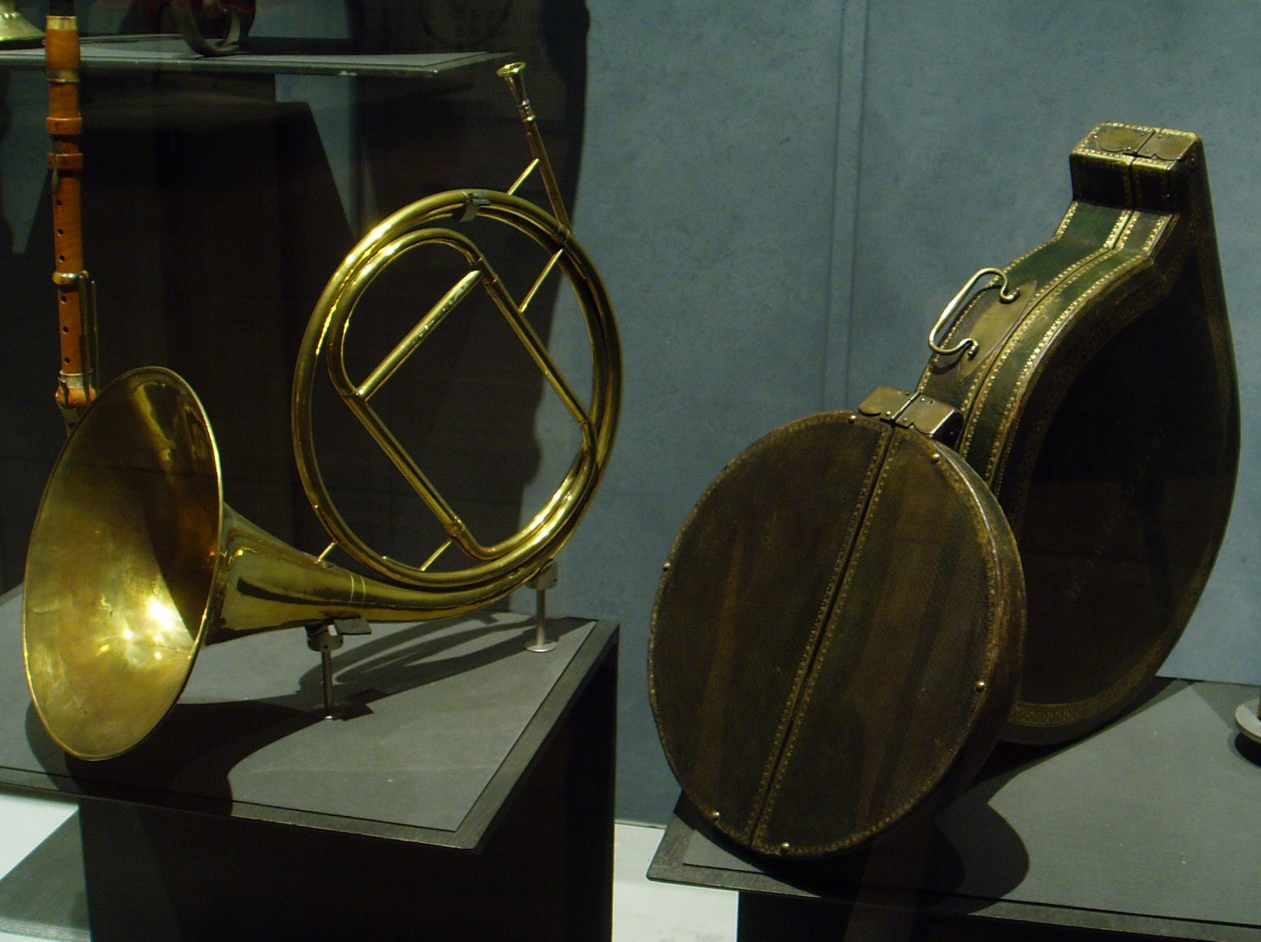 Cor Naturel - G. C. Escenbach, Allemagne, fin du XVIII - Paris, Musée de la musique Etui de cor - France, fin du XVIII - Paris, Musée de la musique